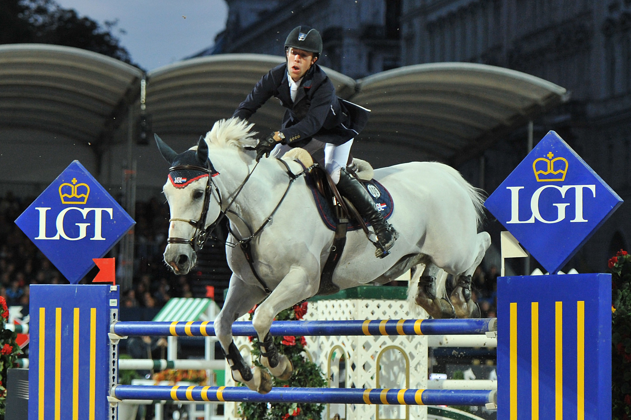 Vienna Masters am 21. September 2013 Longines Global Champions Tour Maikel Van der Vleuten (NED) auf VDL Groep SapphireB